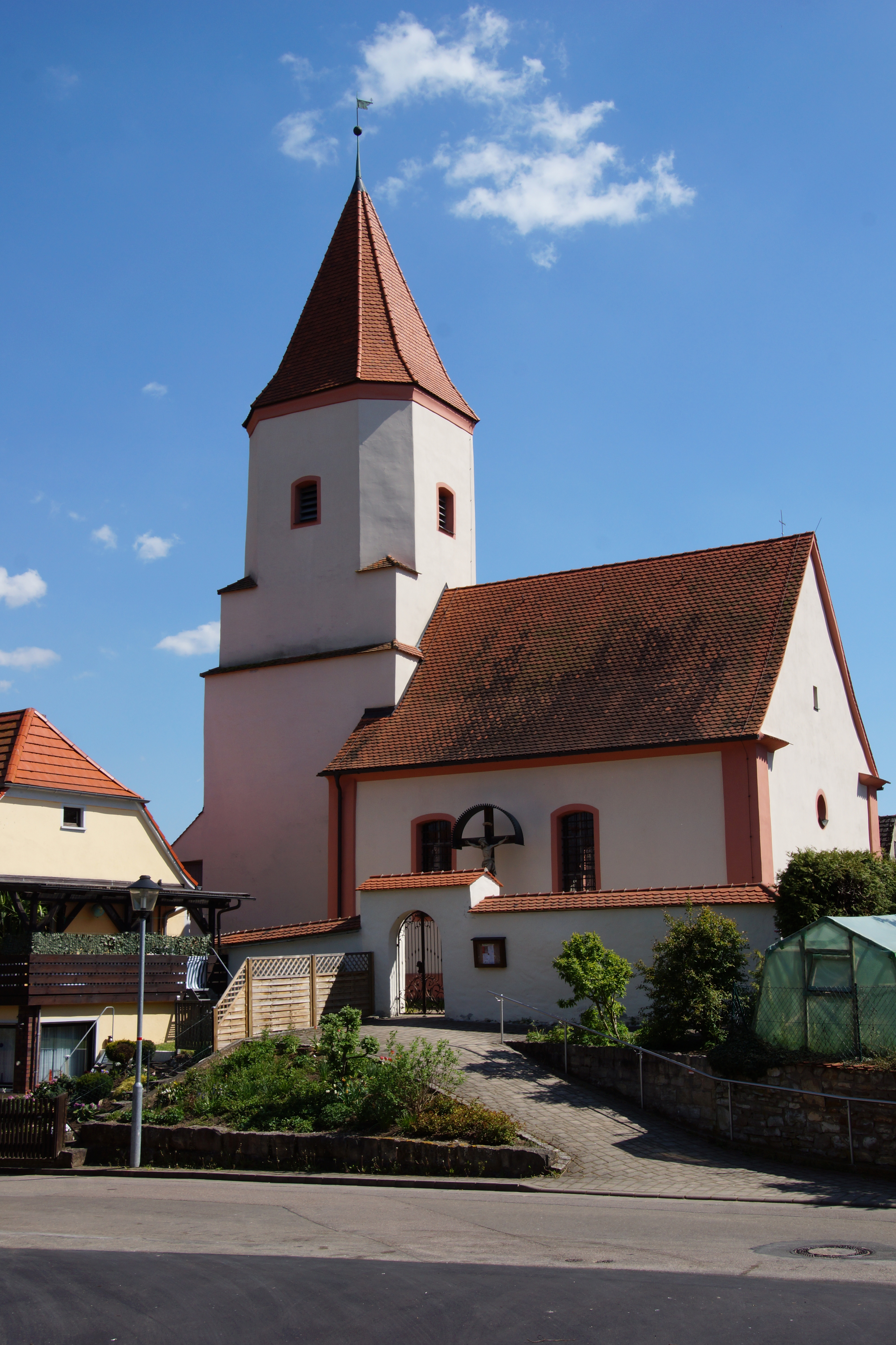 Katholische Filialkirche St Johannes - Evangelis in Lohen bei Thalmässing